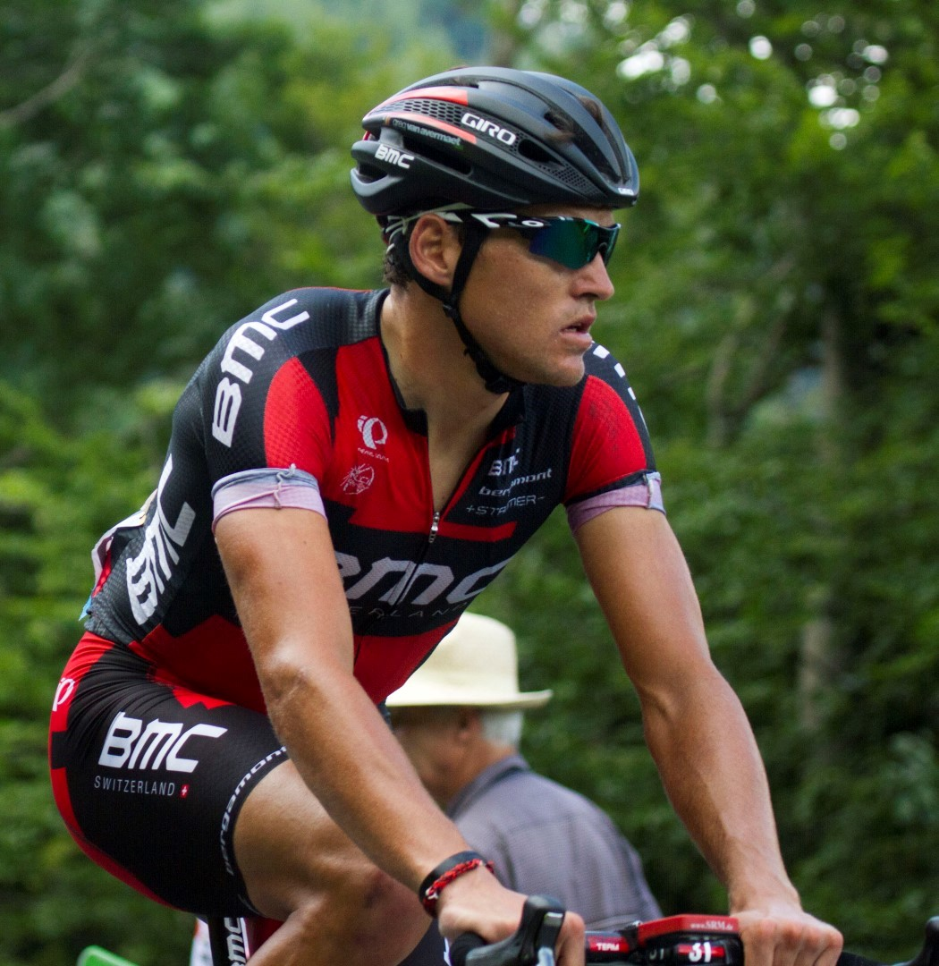 267 van avermaet